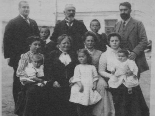 Семья Александра Бари, 1880-е гг.